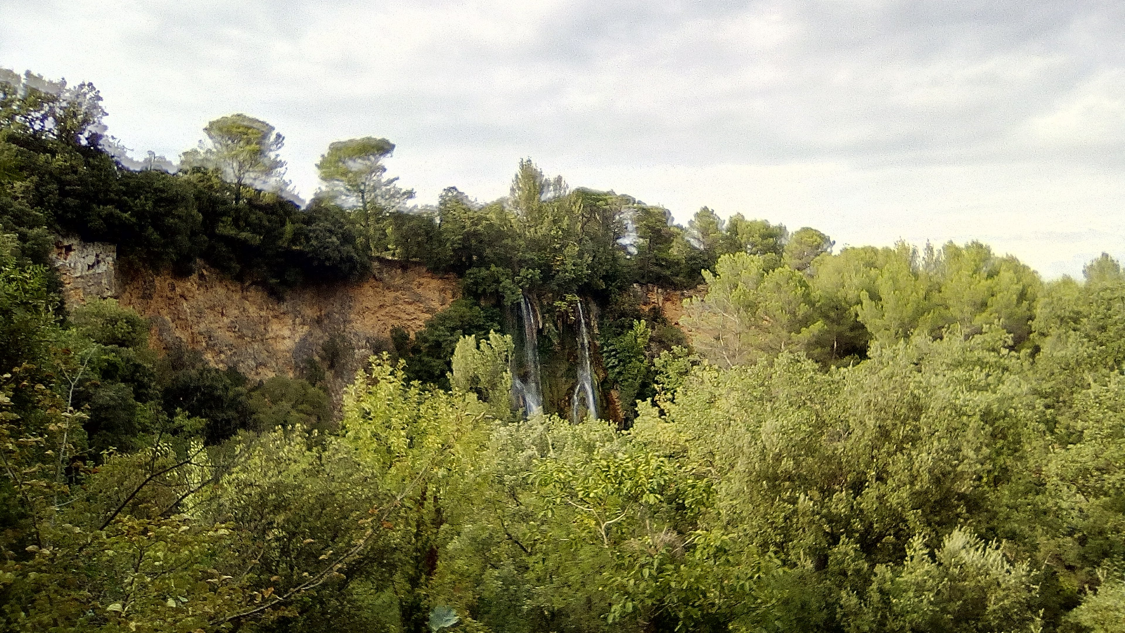 Vue de la cascade de Sillans depuis le belvédère.